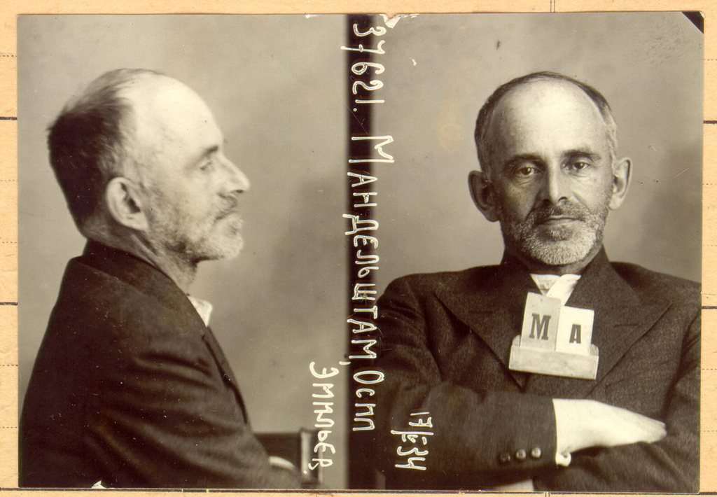 Осип Мандельштам. Тюремная фотография из его следственного дела. Хранится в ЦА ФСБ РФ. Ф. Р-33487